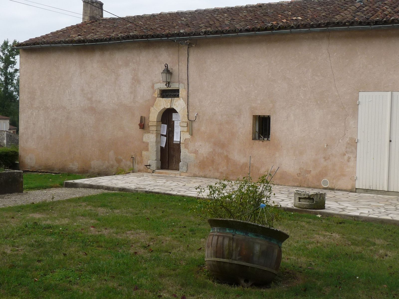 mairie de La Chapelle-des-Pots, Charente-Maritime, France